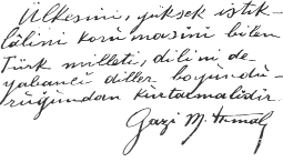 Atatürk'ün kendi el yazısı: Ülkesini, yüksek istiklalini korumasını bilen Türk milleti, dilini de yabancı diller boyunduruğundan kurtarmalıdır.